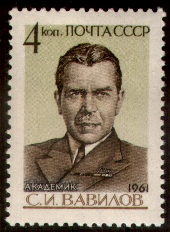 Почтовая марка СССР - Советский физик, Вавилов Сергей Иванович